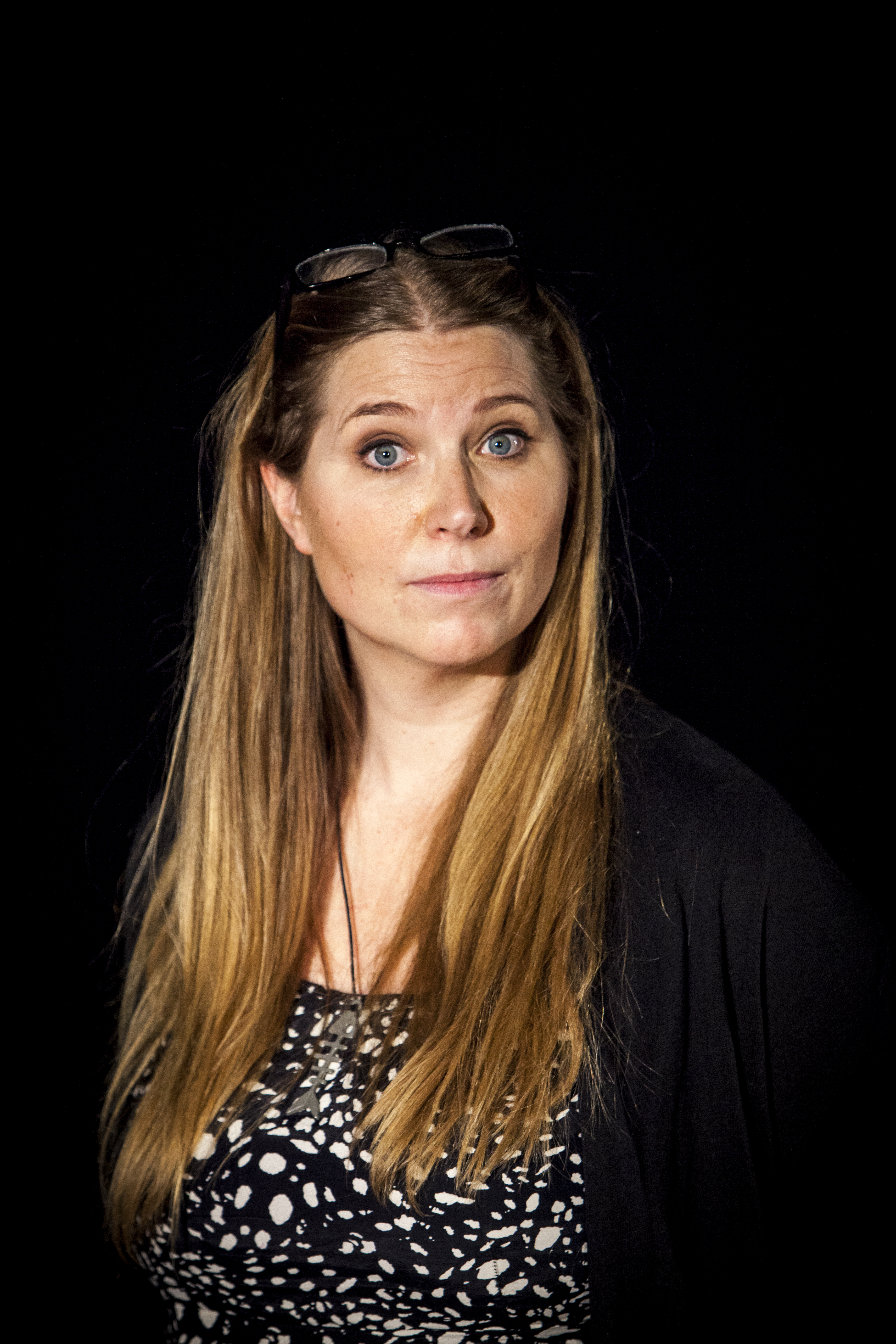 Anna Pettersson, regissör och skådespelare